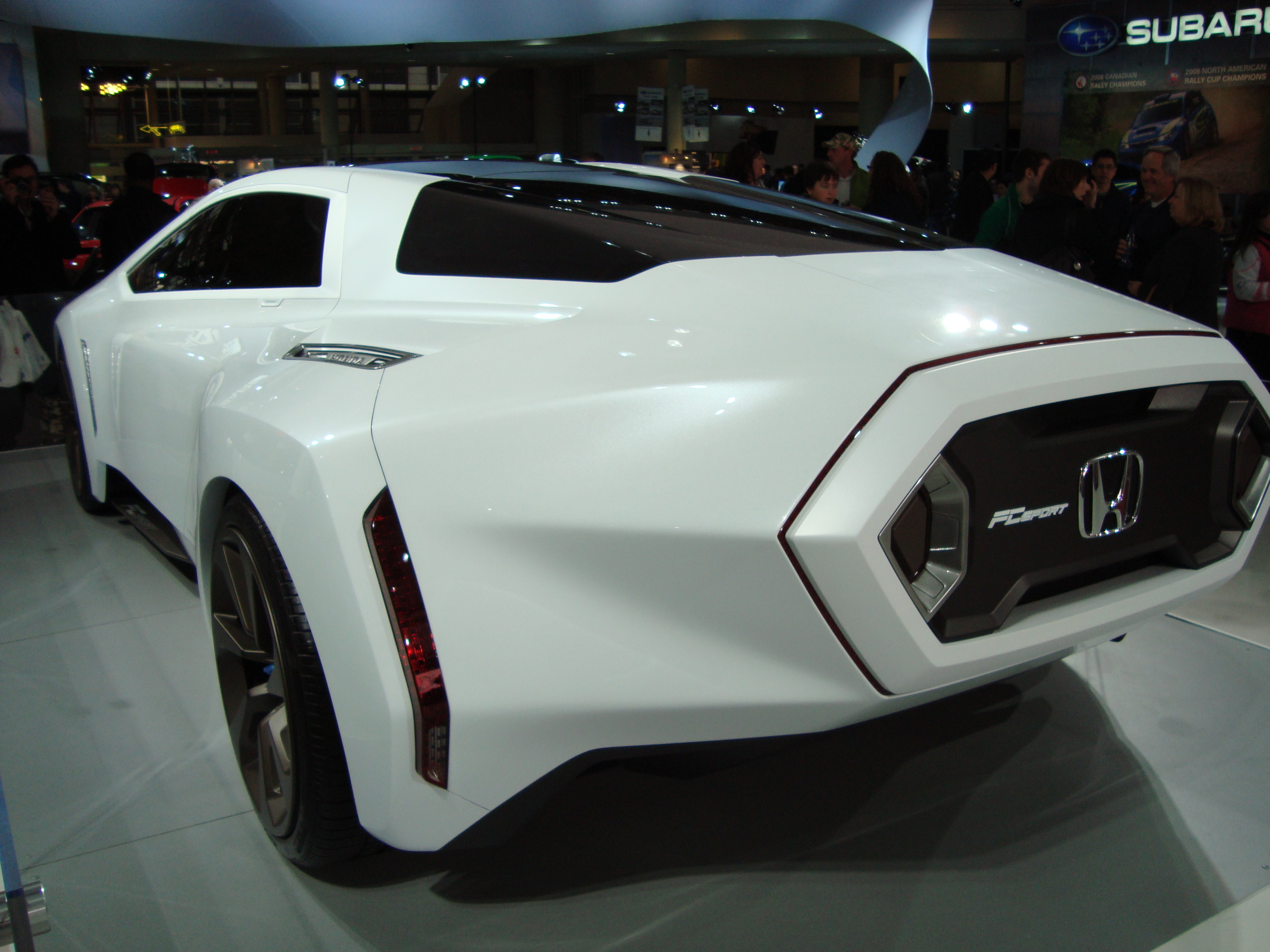 Honda FC rear